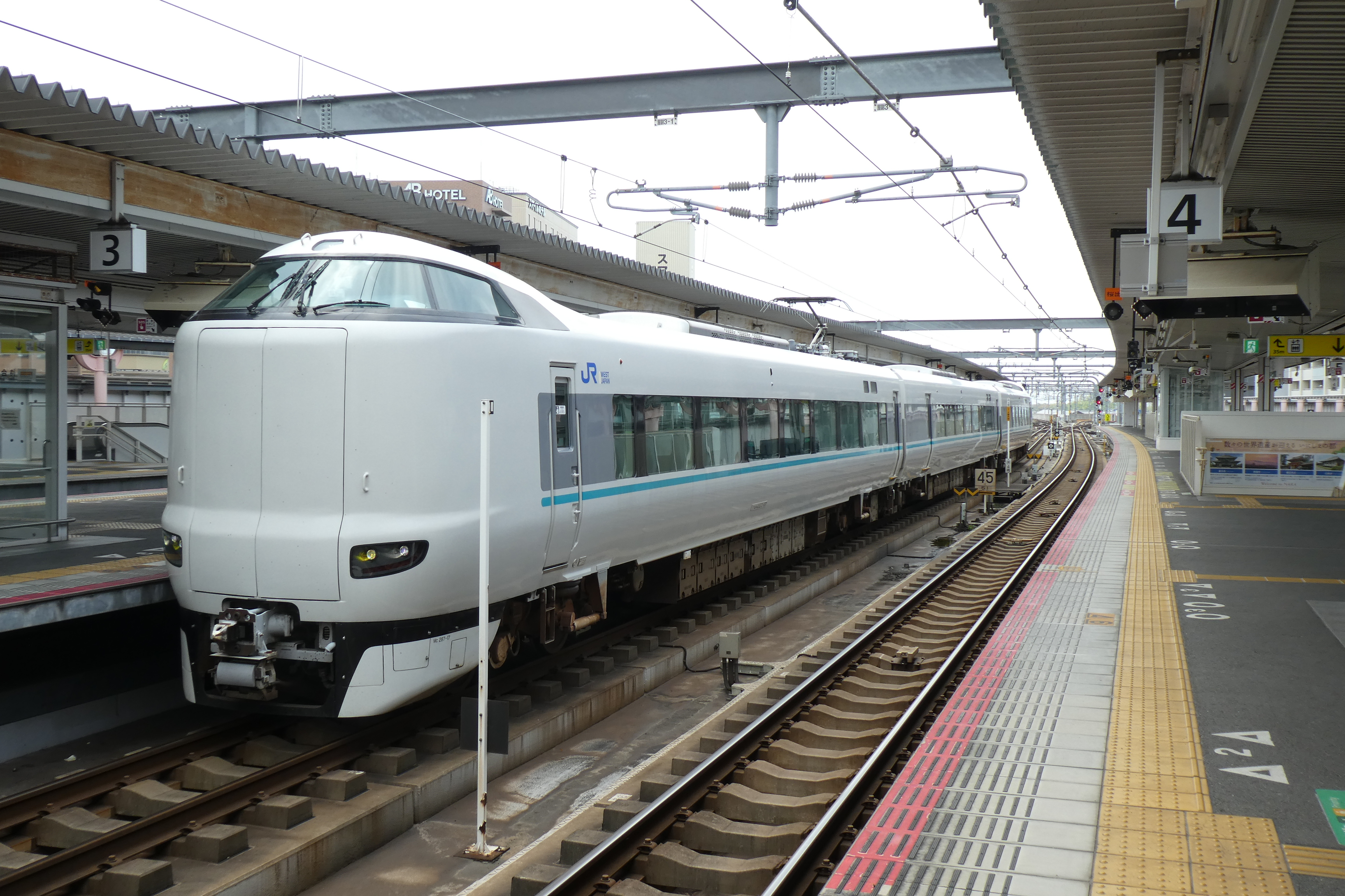 JR西日本287系電車、臨時特急まほろば号